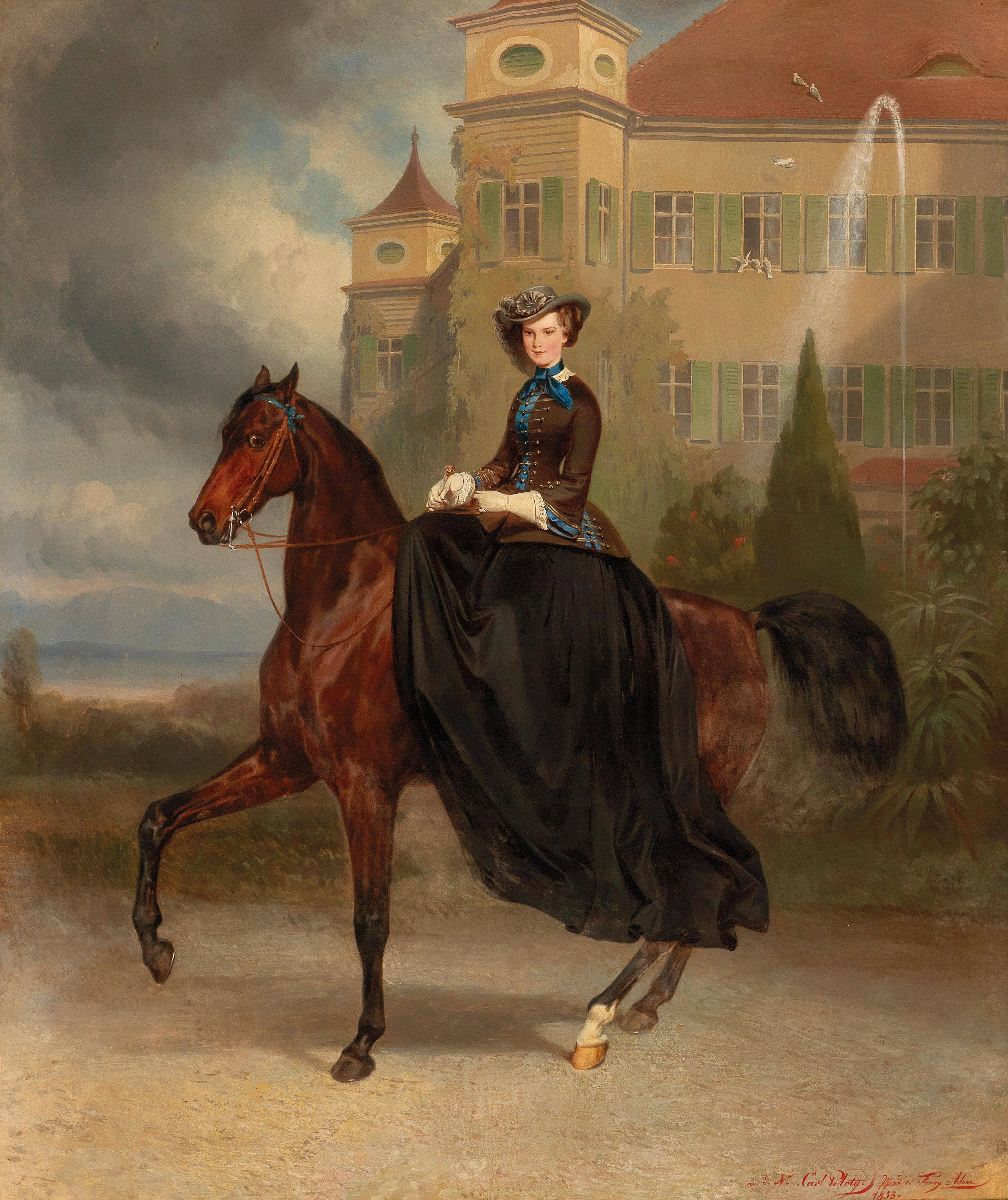 Prinzessin Elisabeth in Bayern im Alter von 15 Jahren zu Pferde, Portrait, Verlobungsgeschenk an Franz Joseph I von Österreich, hing rund 60 Jahre über dem Bett des Kaisers in der Hofburg; vererbt an die Erzherzogin Marie Valerie, Versteigerung 27. April 2017 im Dorotheum, Wien